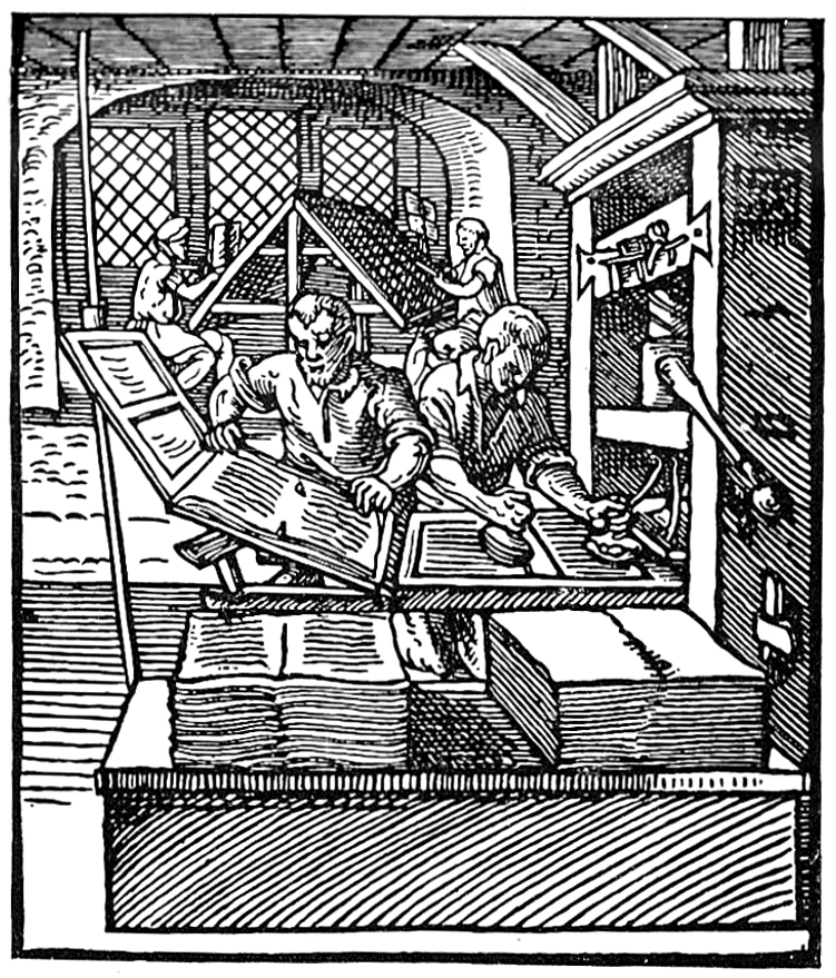 Darstellung des Buchdruckerhandwerks.